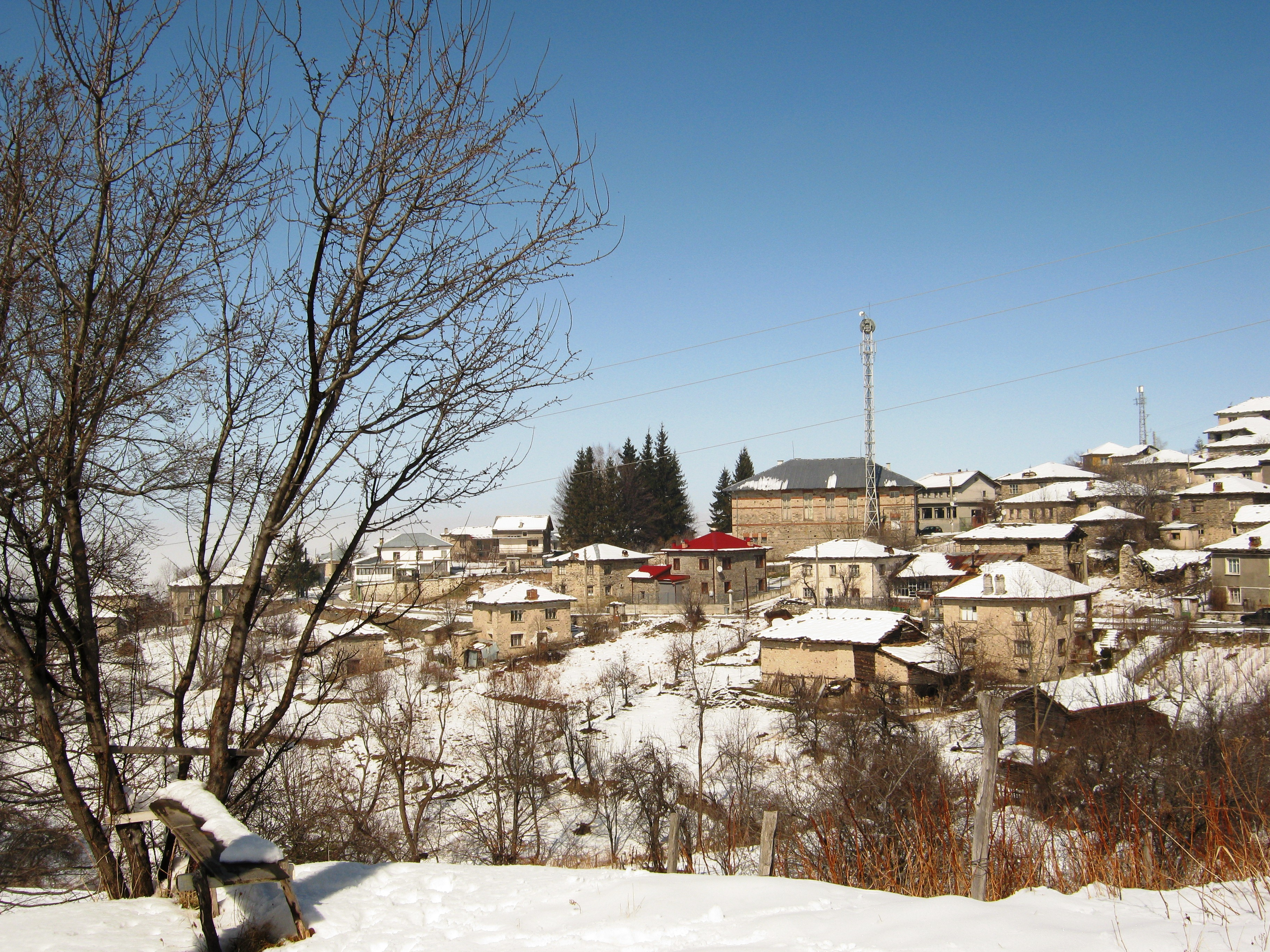 4227 Skobelevo, Bulgaria